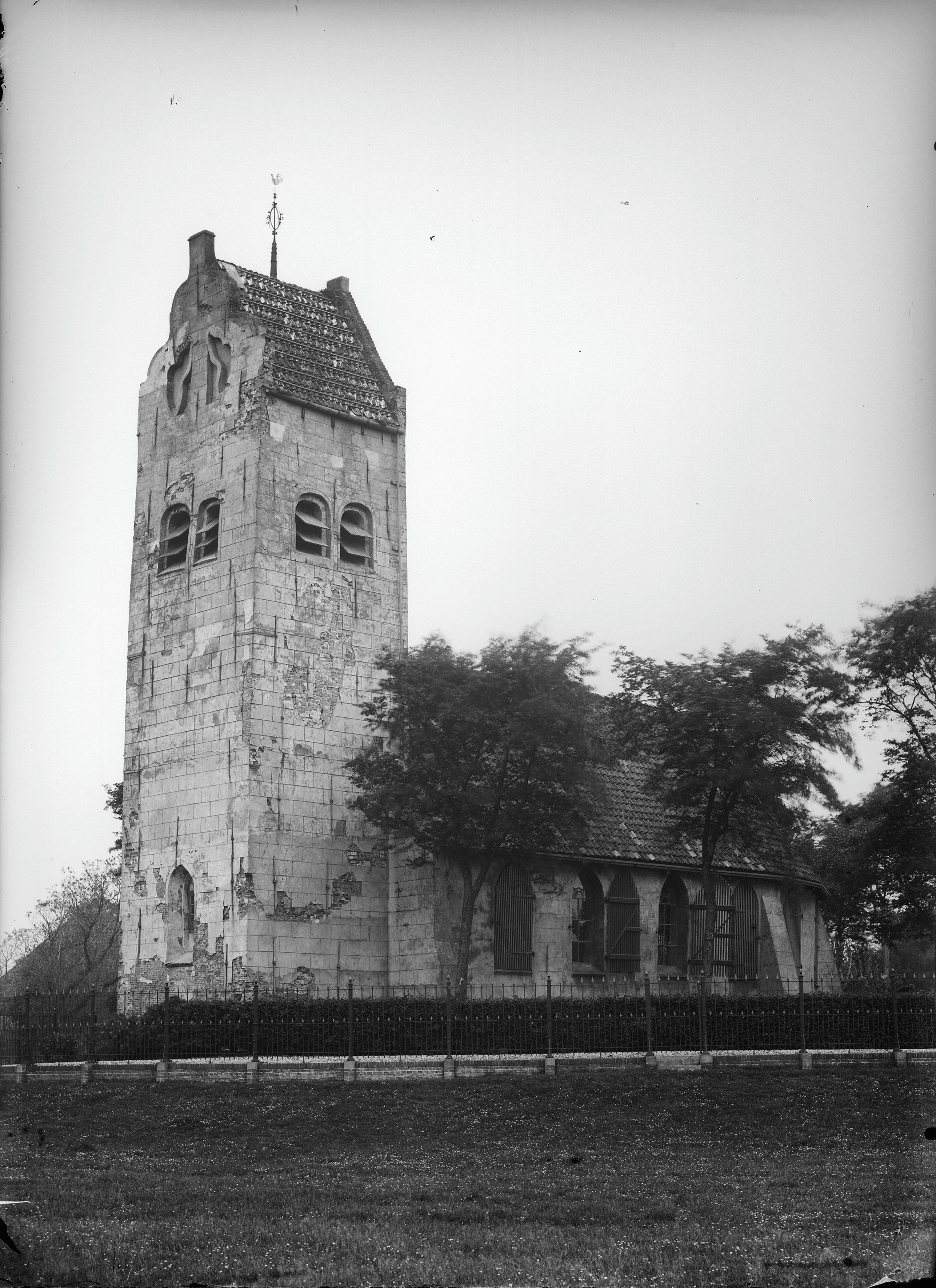 N.H.Kerk: zuid-west aanzicht - Dit is de oude hervomde kerk, die is in 1889 afgebroken voor nieuwbouw